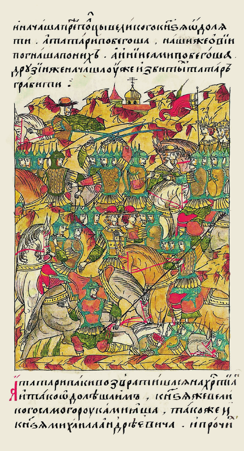 "но татары возврати- лись и обрушились на христиан, и одолели их. Самого великого князя пленили, так же как и князя Михаила Ан- дреевича, и остальных" 7 июля 1445 года в сражении у окрестностей Суздаля Василий II с объединенными русскими войсками потерпел поражение от казанского войска, под командованием казанских царевичей — Махмуда и Якуба (сыновей хана Улу-Мухаммеда), в результате сам Василий II и его двоюродный брат Михаил Верейский были взяты в плен